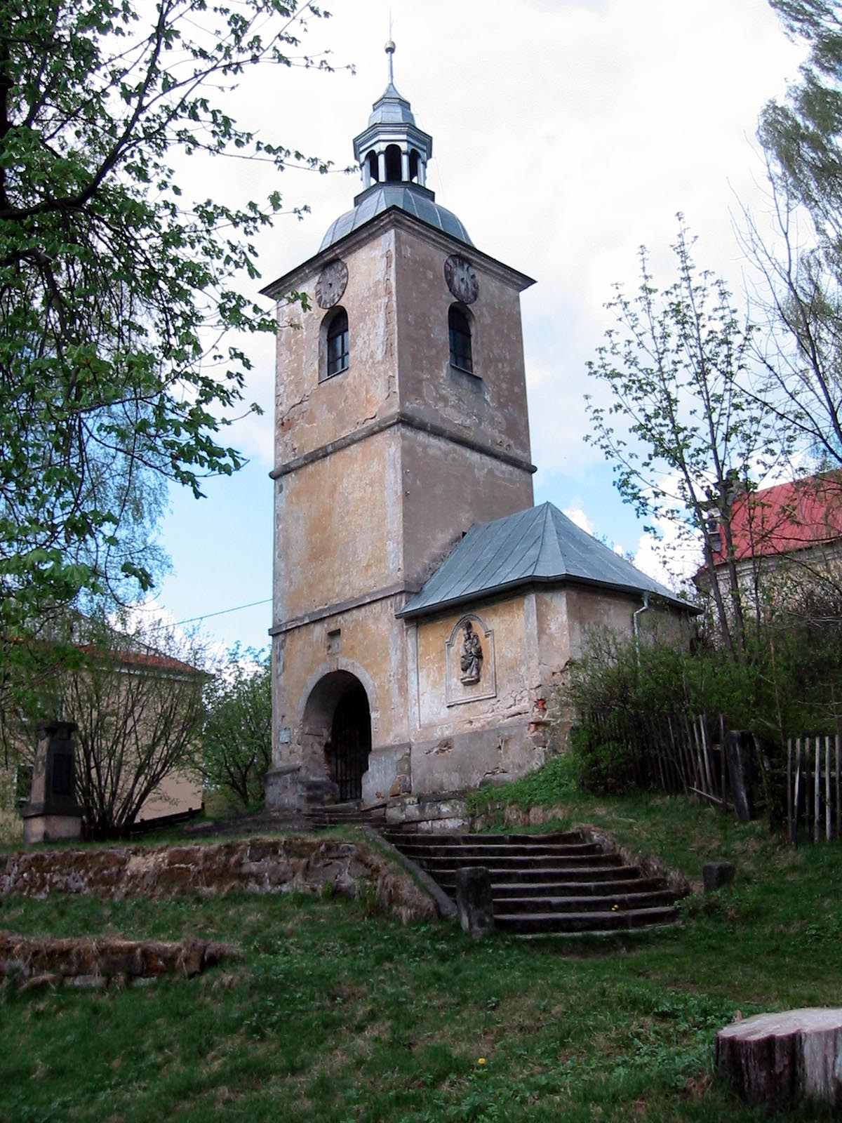 Zvonice v Prysku, okres Česká Lípa